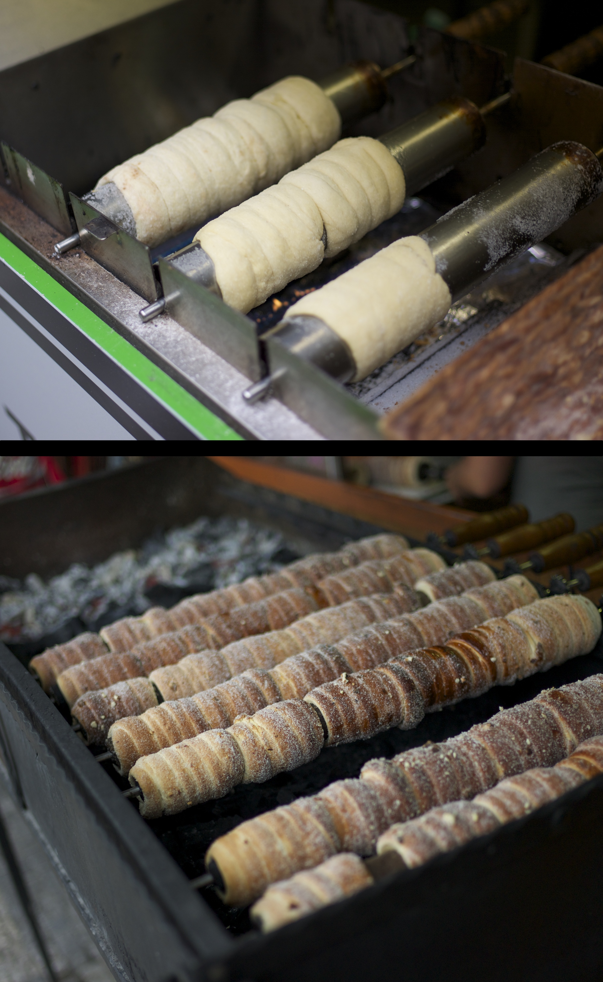 Trdlnik / Trdelník from Czech Republik / Tschechische Republik